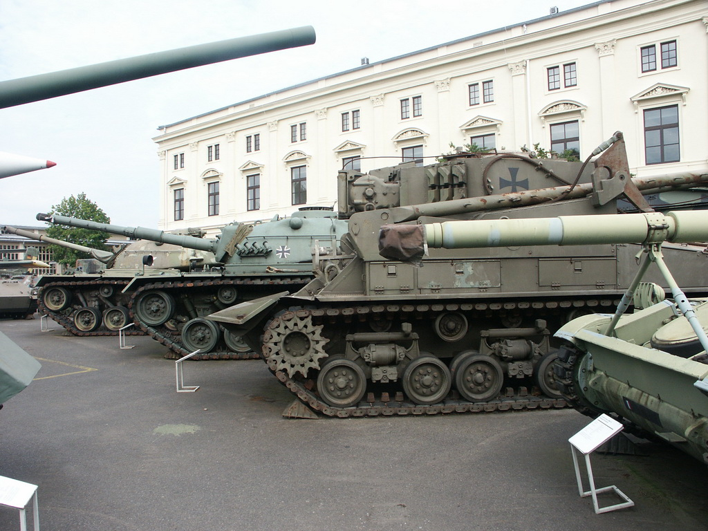 Bundeswehrmuseum Dresden mit Teilen von der NVA Remark: M32 ARV.